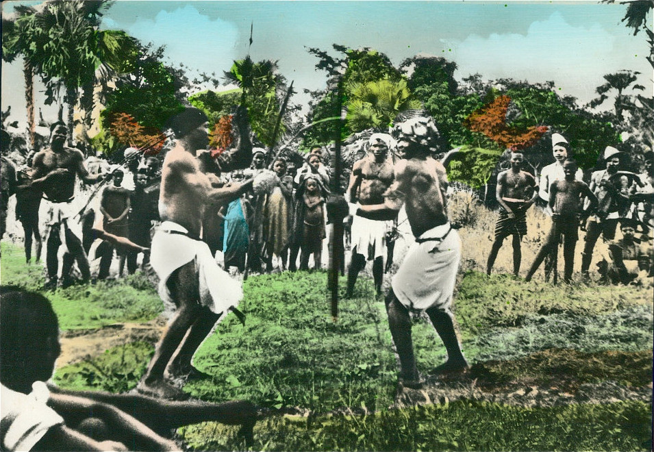 Postcard: CI No 09 - Guiné Portuguesa - Luta da Mantampa "Papeis"